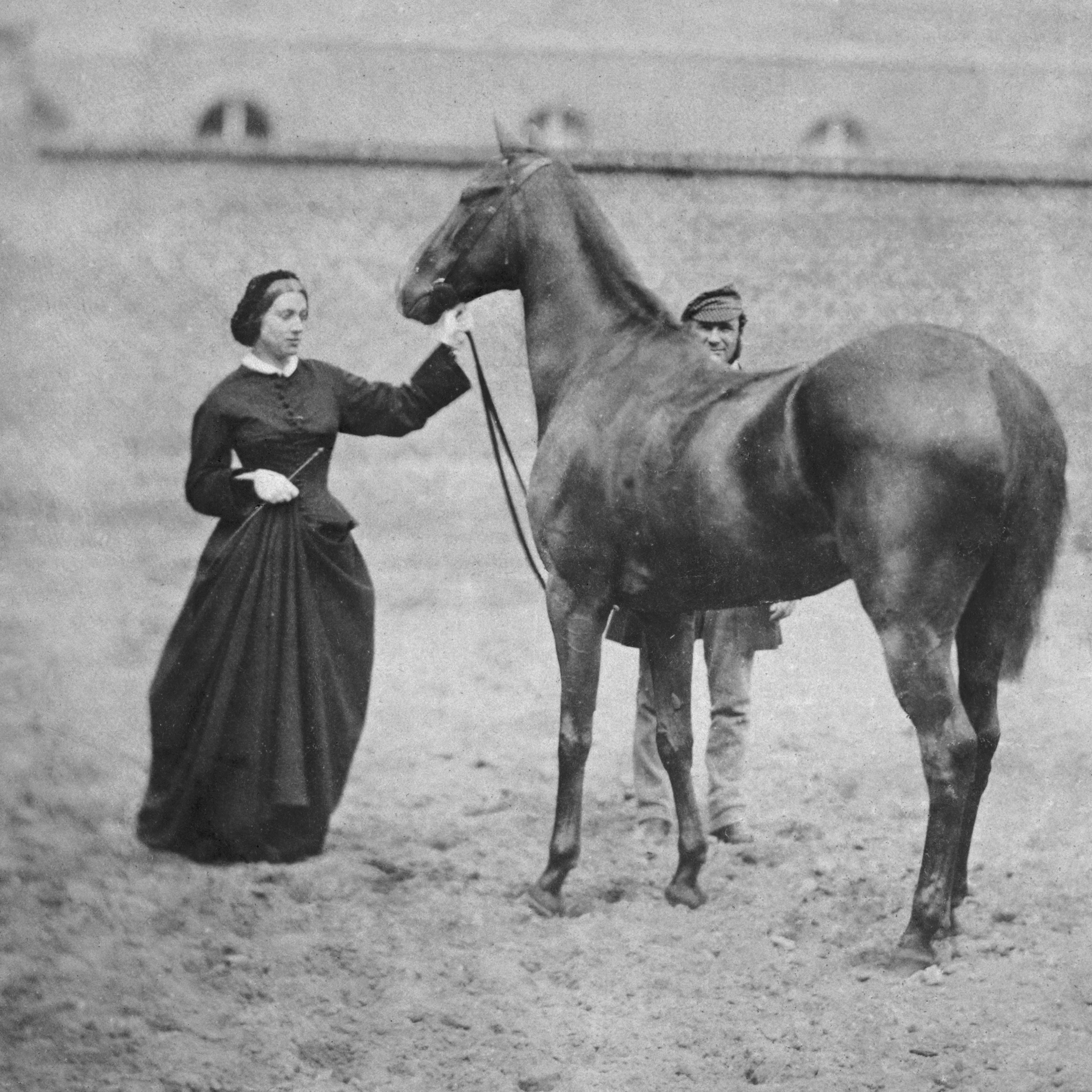 Alexine Tinne in de Haagse Manege, Kazernestraat 50 vermoedelijk zomer 1860 Collectie Nationaal Archief, Den Haag